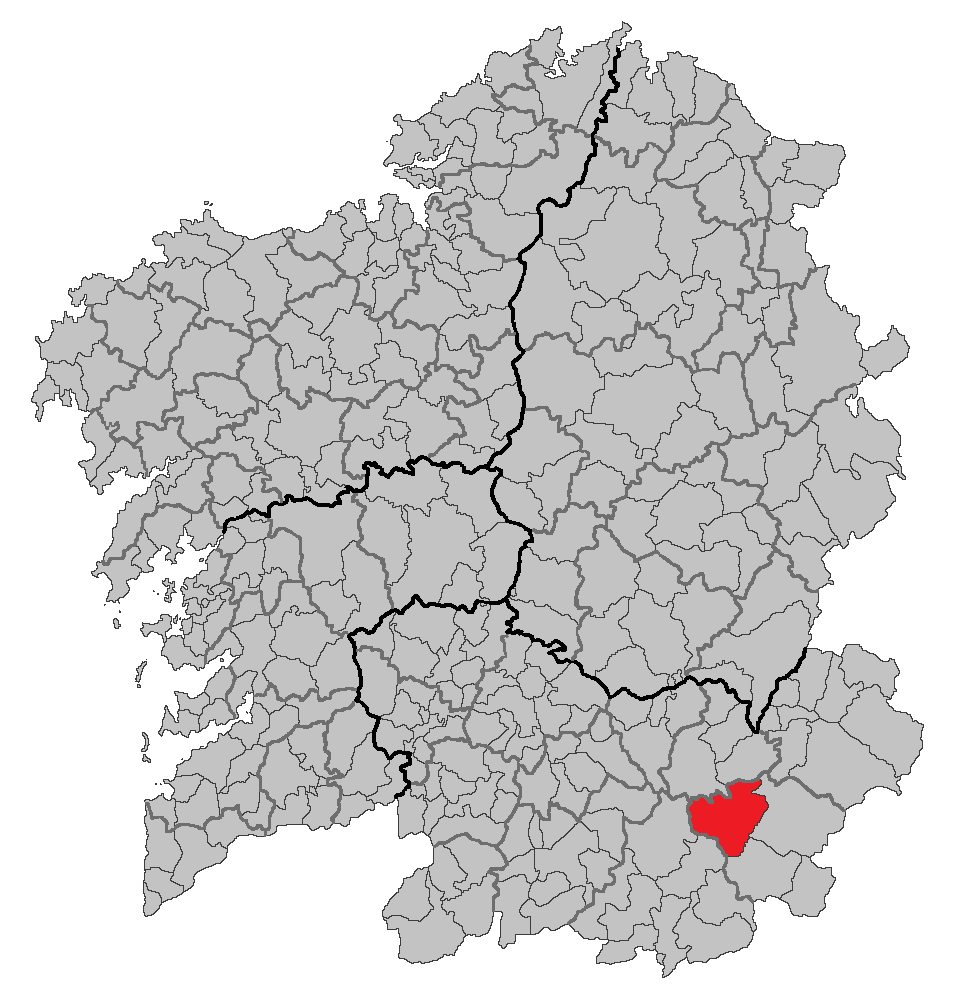 Mapa coa localización do concello de Vilariño de Conso.